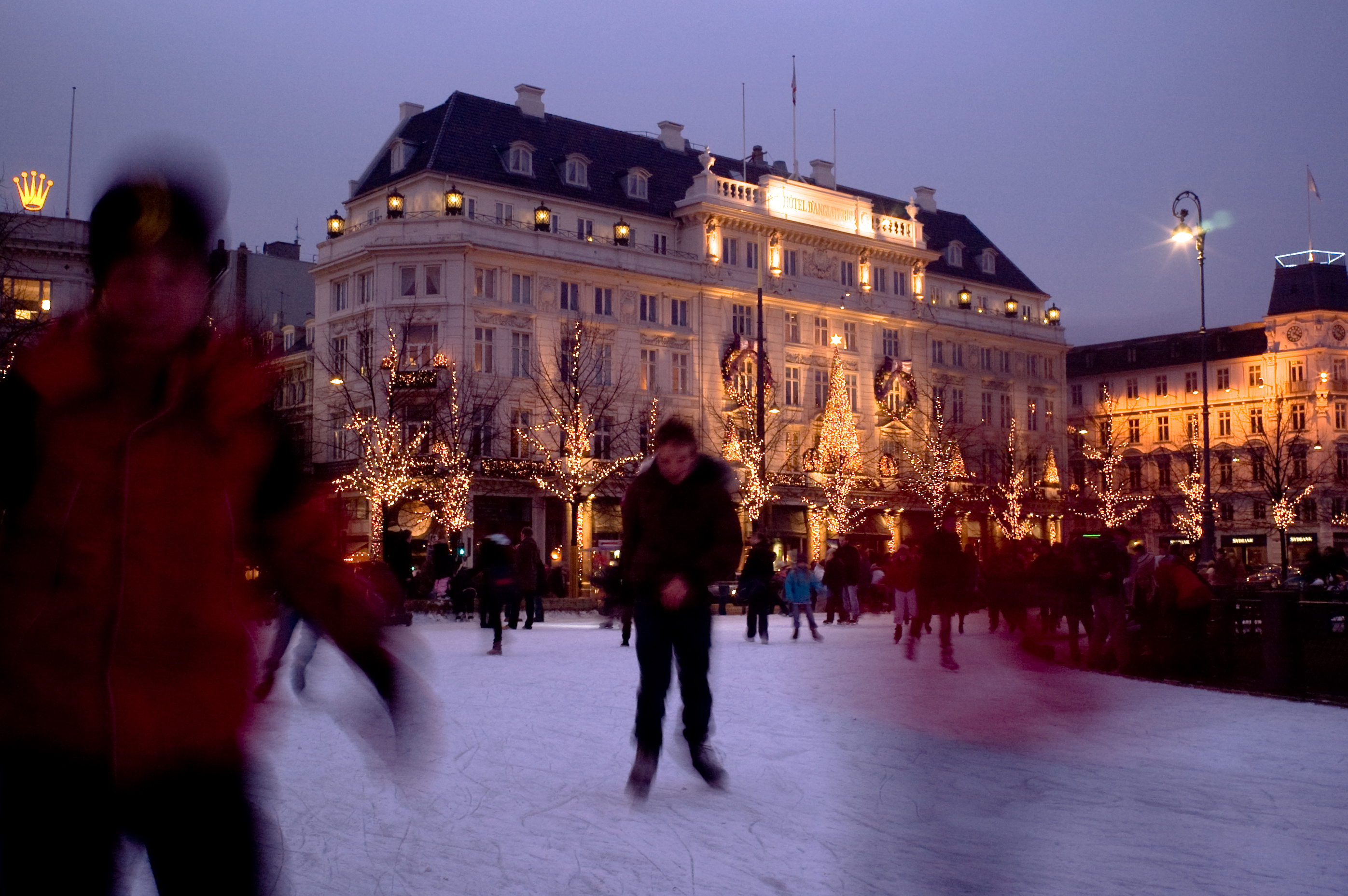 Skaters at Kongens Nytorv in Copenhagen, Denmark